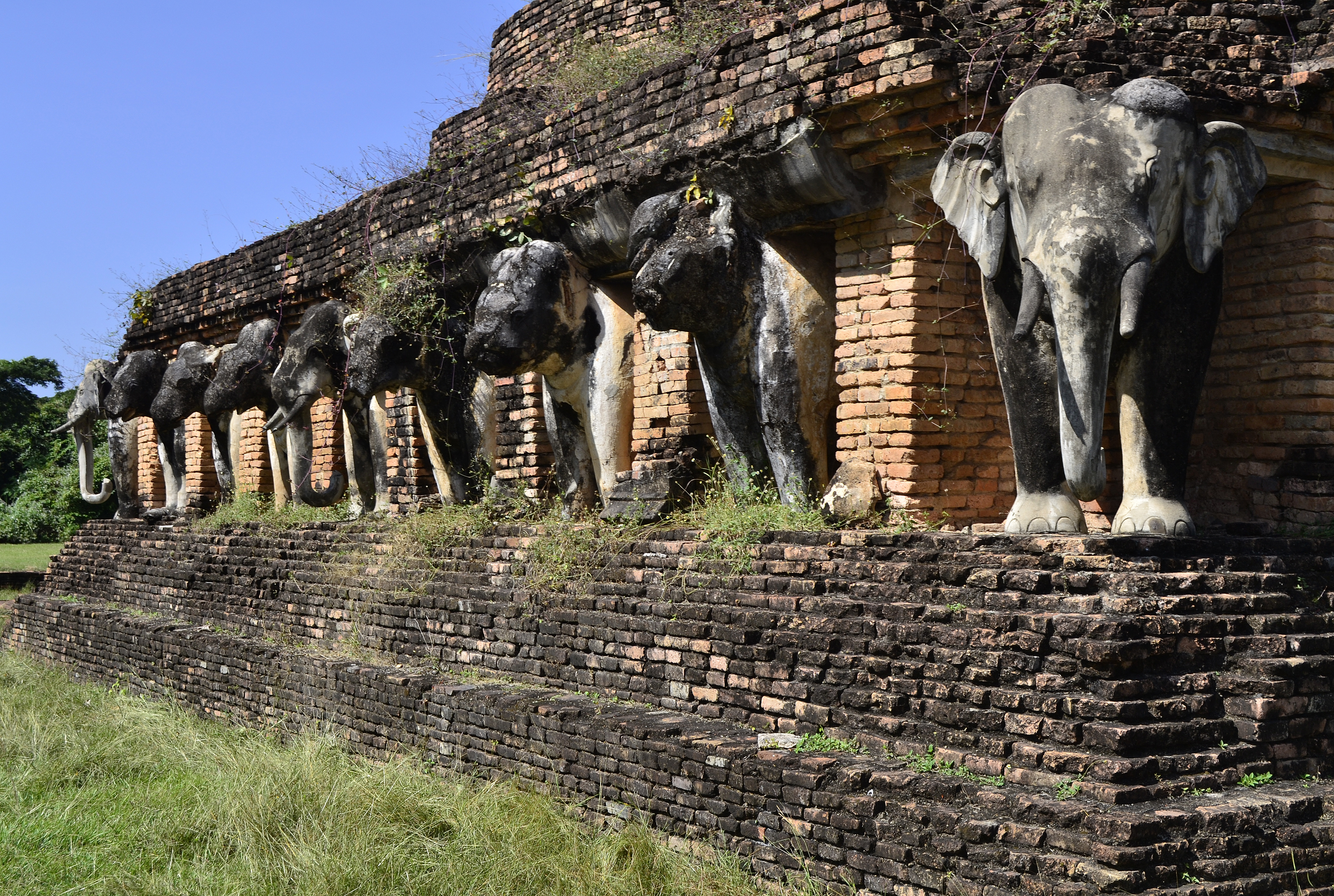 Wat Chang Lom im Geschichtspark Sukhothai